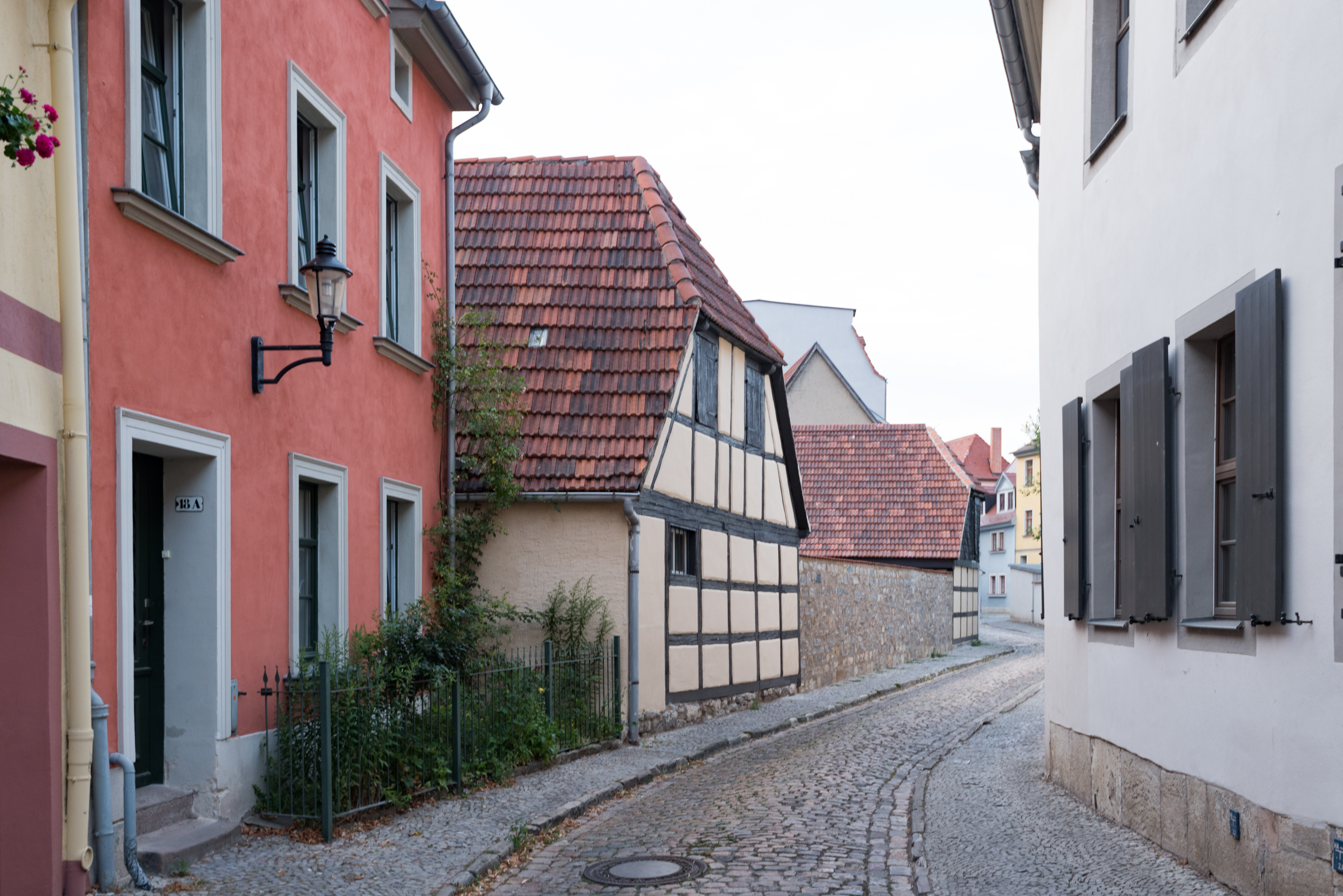 Naumburg (Saale), Dompredigergasse 17, 17a